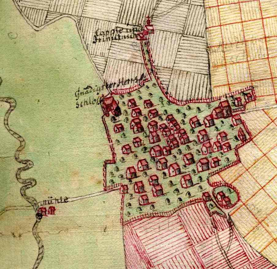 Krauchenwies, Ansicht von 1733, Ausschnitt aus einem Grundriss über das Dorf Krauchenwies (Signatur: Staatsarchiv Sigmaringen K I Sig/13)